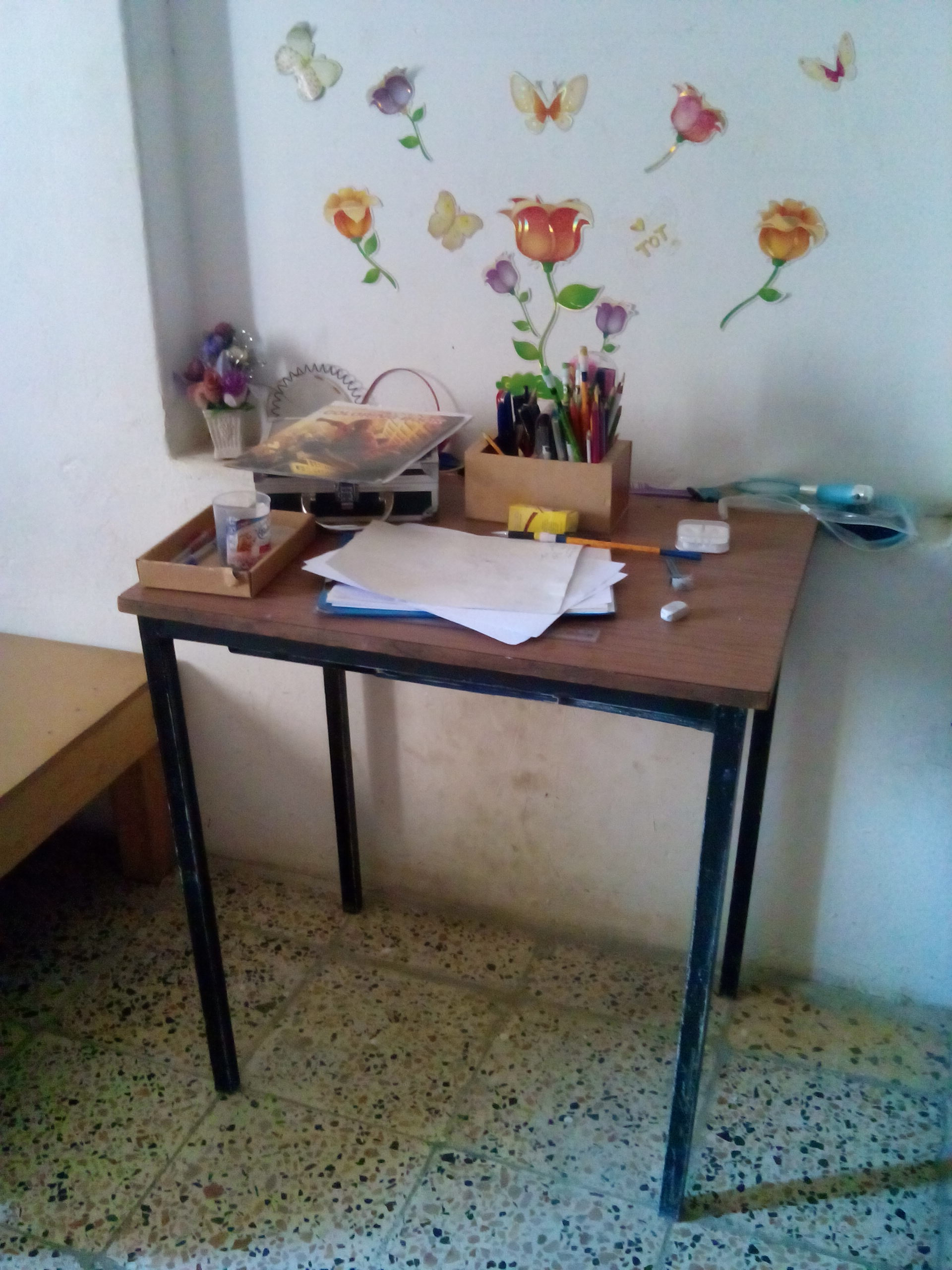 منضدة للكتابة ذات سطح من الخشب